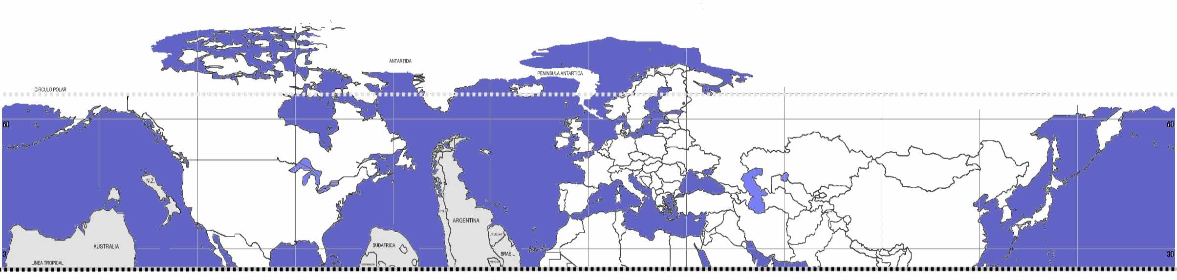 mapa de las regiones entre el polo y los tropicos, dispuestos para comparar su latitud relativa. Paises invertidos hacia el norte, en gris